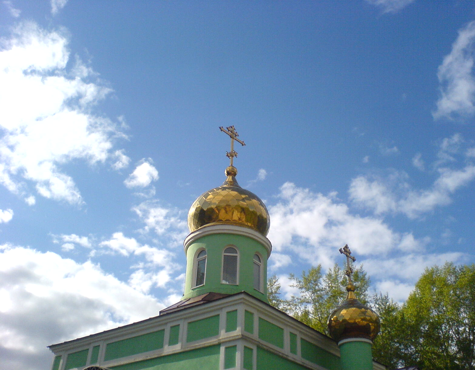 Купол храма Блаженной Ксении Петербургской на Восточном кладбище Екатеринбурга